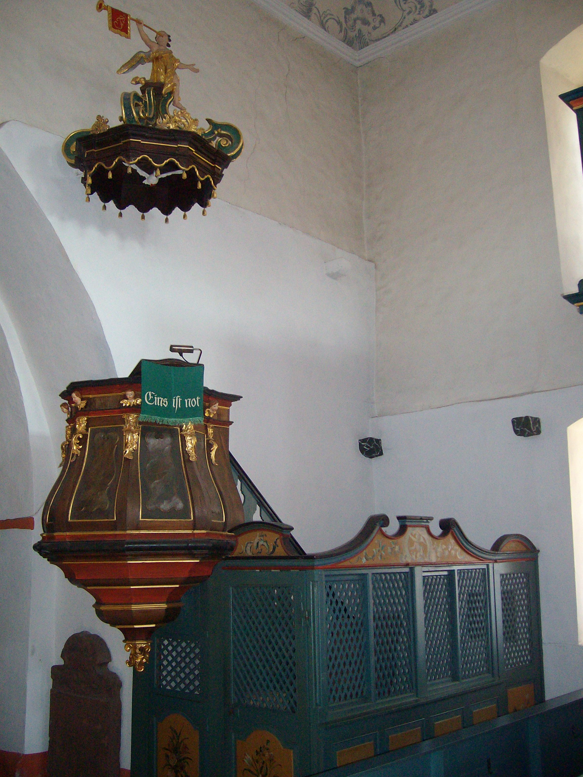 Kanzel der Evangelischen Kirche Freienseen, Laubach, Landkreis Gießen, Hessen, Deutschland